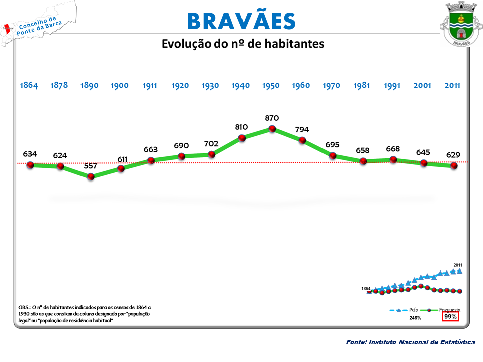 Censos 1864/2011